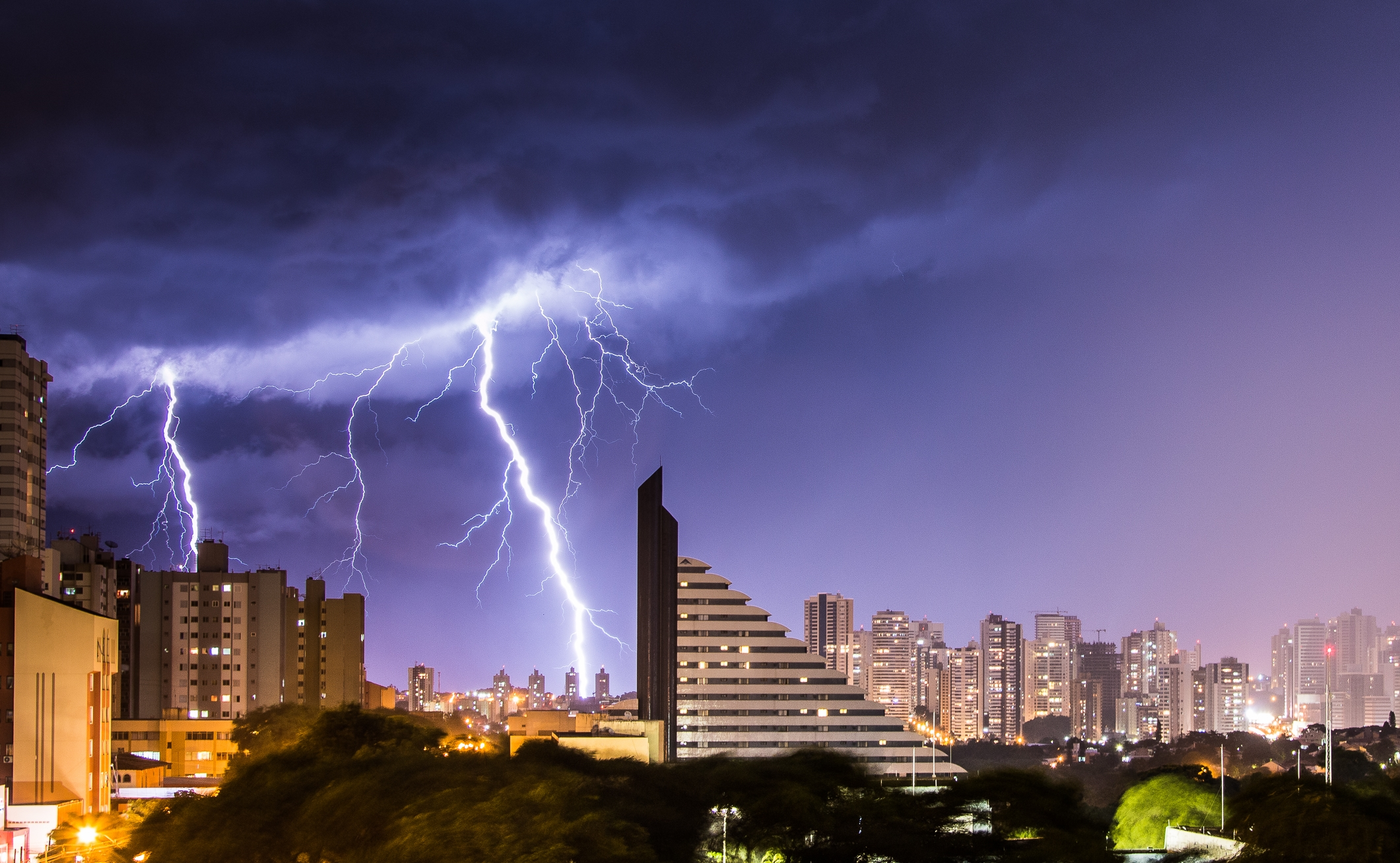 Tempestade em Londrina, Paraná, Brasil.